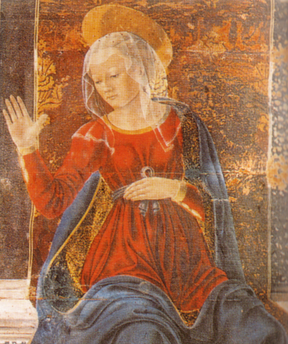 Vergine annunciata di alesso baldovinetti, cappella del cardinale di portogallo, 1466 circa